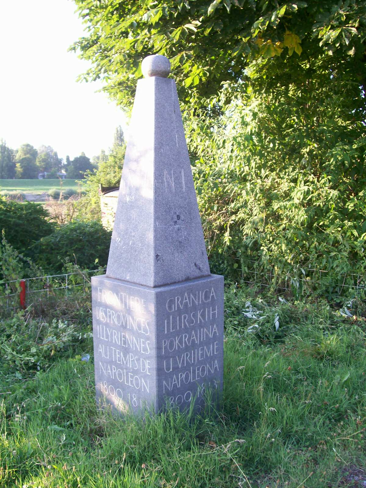 Granica Ilirskih pokrajina u vrijeme Napoleona 1809.-1813. - oznaka kod Savskog mosta u Zagrebu